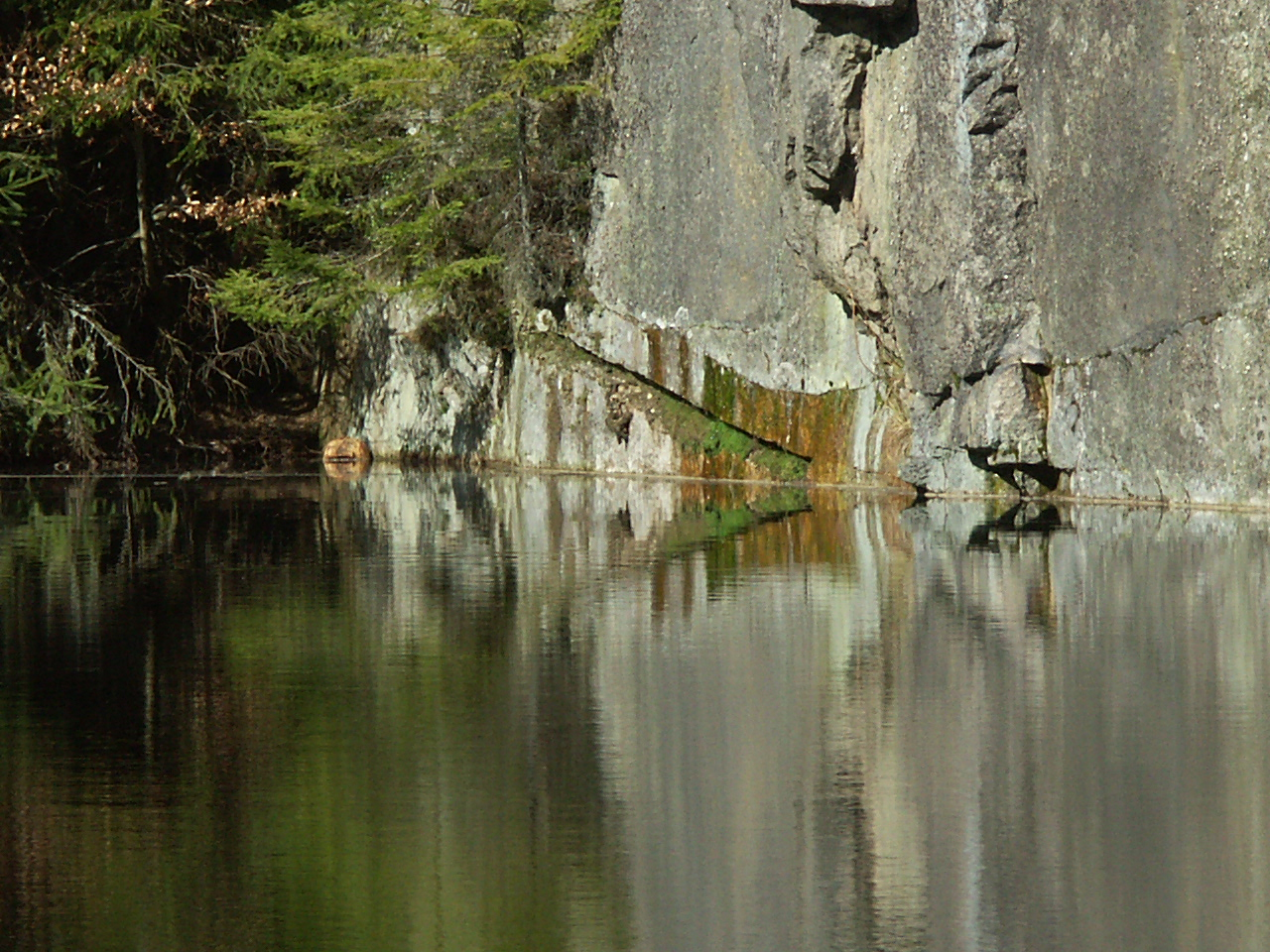 Granit-Steinbruch Forstwiesenbruch in Kirchenlamitz, Bavaria Photo by JP-Donzey